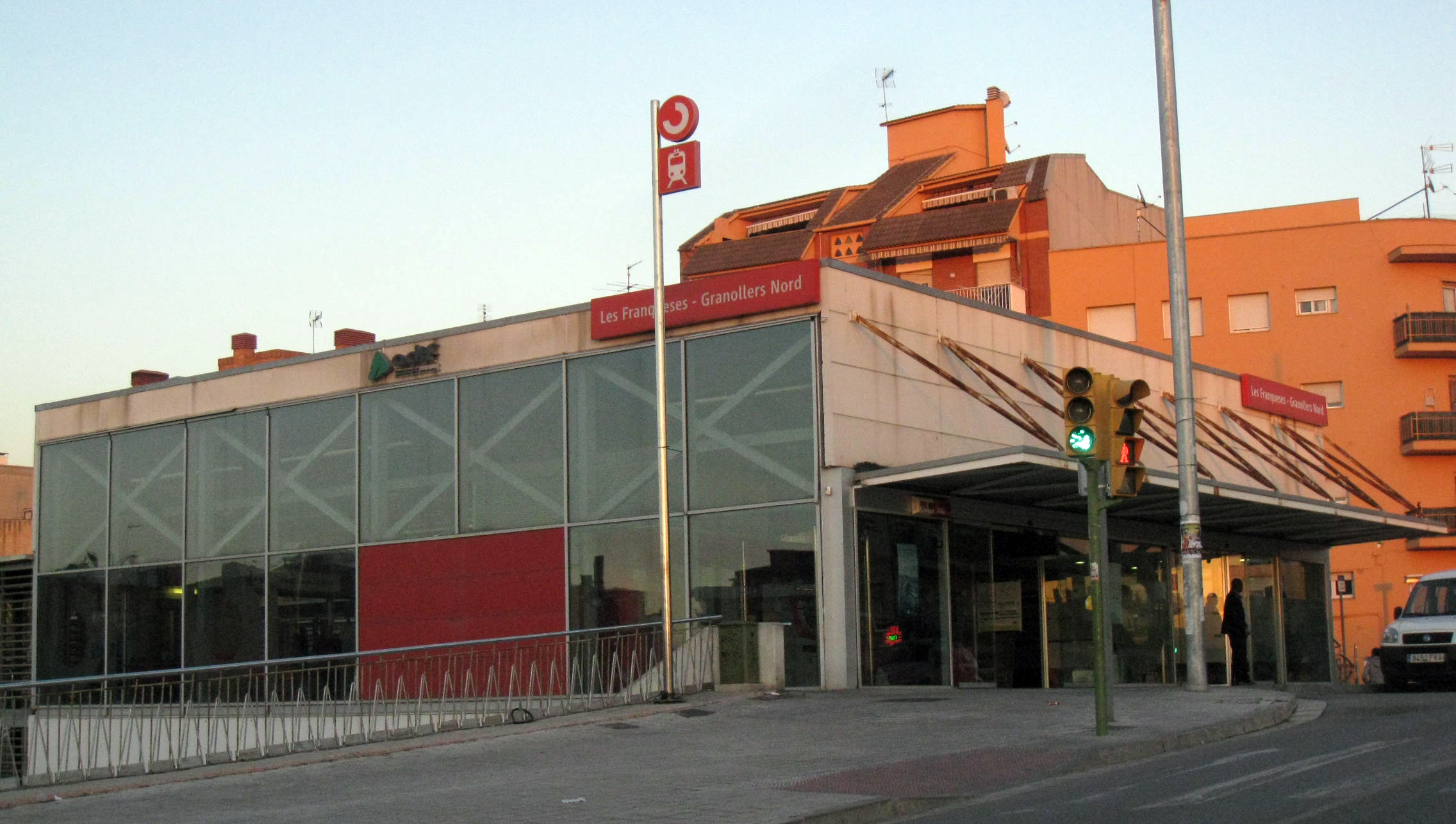 Estació de les Franqueses - Granollers Nord (Vallès Oriental).